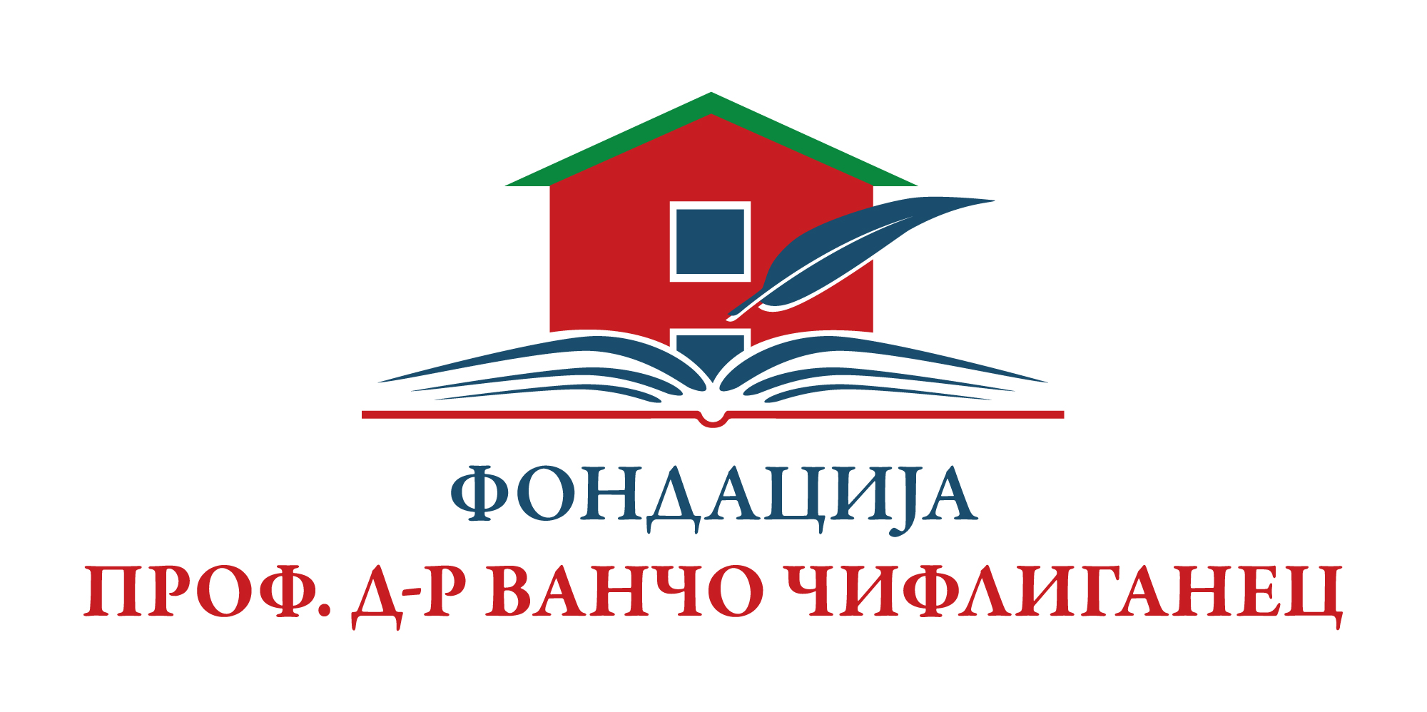 Fondacija Cifliganec